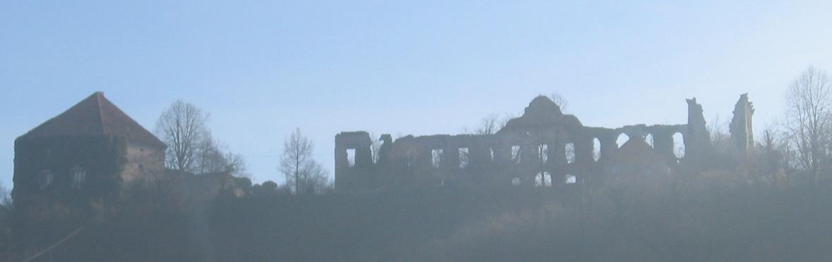 Boštanj (Weissenstein) castle, Slovenia photo:Ziga 11:18, 5 February 2007 (UTC)